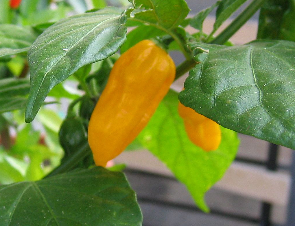 Capsicum chinense, Fatalii